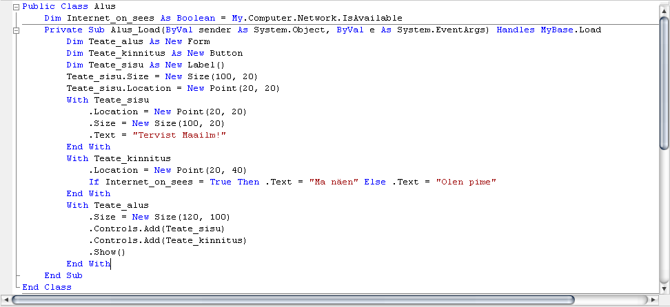 Koodinäide